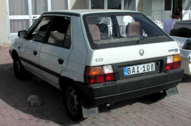 Skoda Favorit